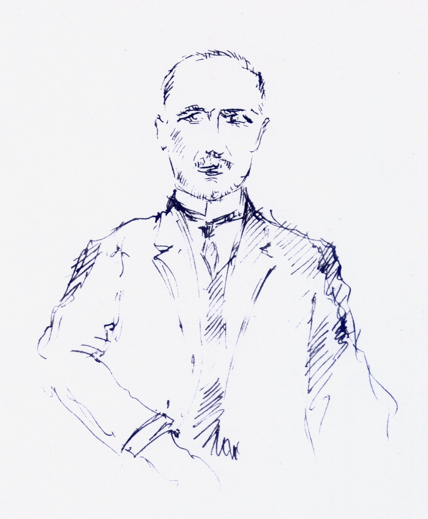 Portrait of Gabriel van Dievoet (1875–1934), Belgian painter